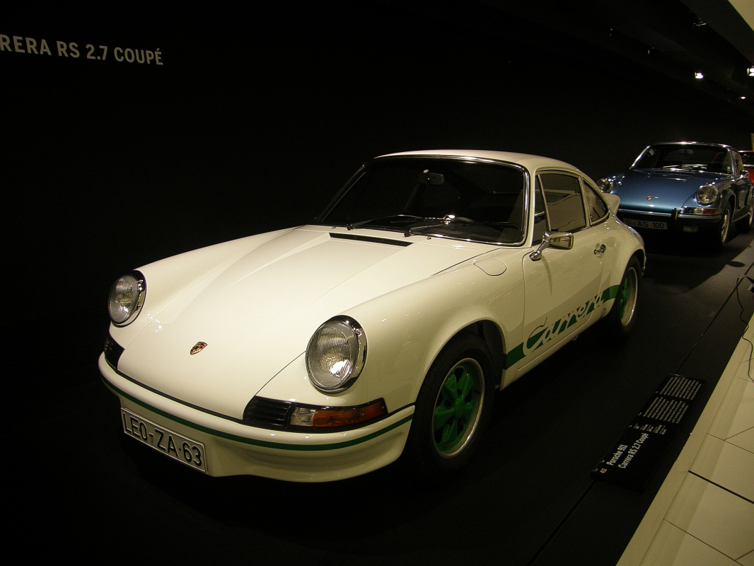 Bilder aus dem Porsche Museum Native namePorsche-MuseumLocationStuttgartCoordinates48° 50′ 07″ N, 9° 09′ 06″ E Established1976 (old museum) 2009 (new museum)Web page control : Q328623 VIAF: 138511768 GND: 2087859-X SUDOC: 155641123 NKC: ko2015876799 institution QS:P195,Q328623